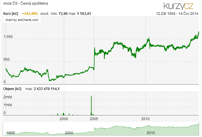 Akcie ČESKÁ SPOŘITELNA - Graf vývoje kurzu na Burze Praha.